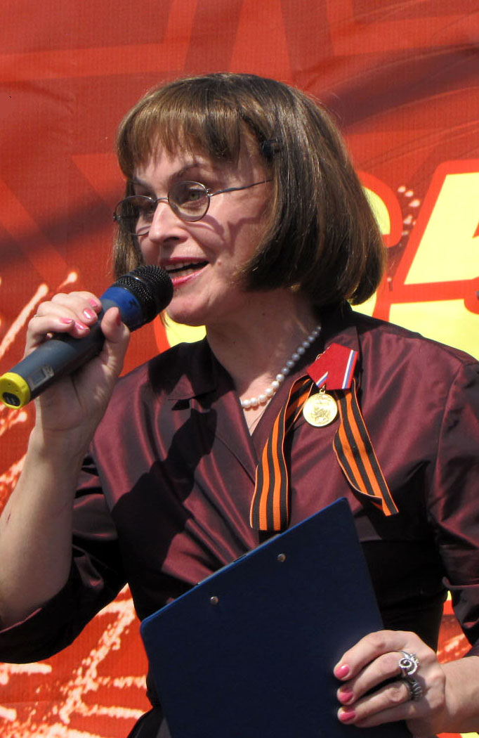 Алла Георгиевна Данько. Район Чертаново Южное города Москвы, 8 мая 2010 года